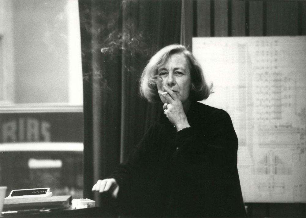 Die Schauspielerin Rosemarie Fendel im Hörspielstudio in einer Aufnahme des Berliner Fotografen Werner Bethsold.